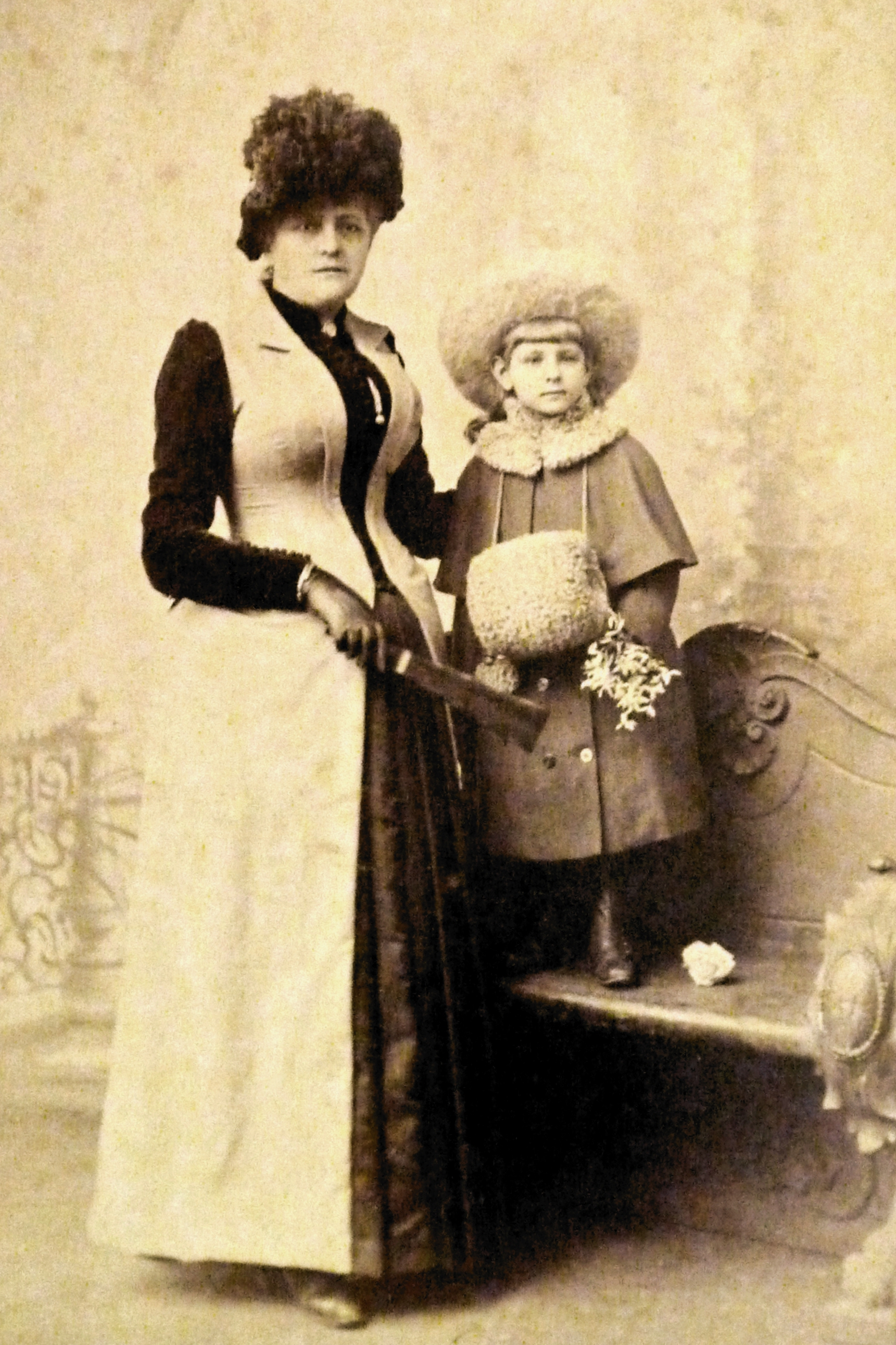 Kasia von Szadurska mit ihrer Adoptivmutter, Foto aus Dresden in einer Ausstellung im Neuen Schloss zu Meersburg